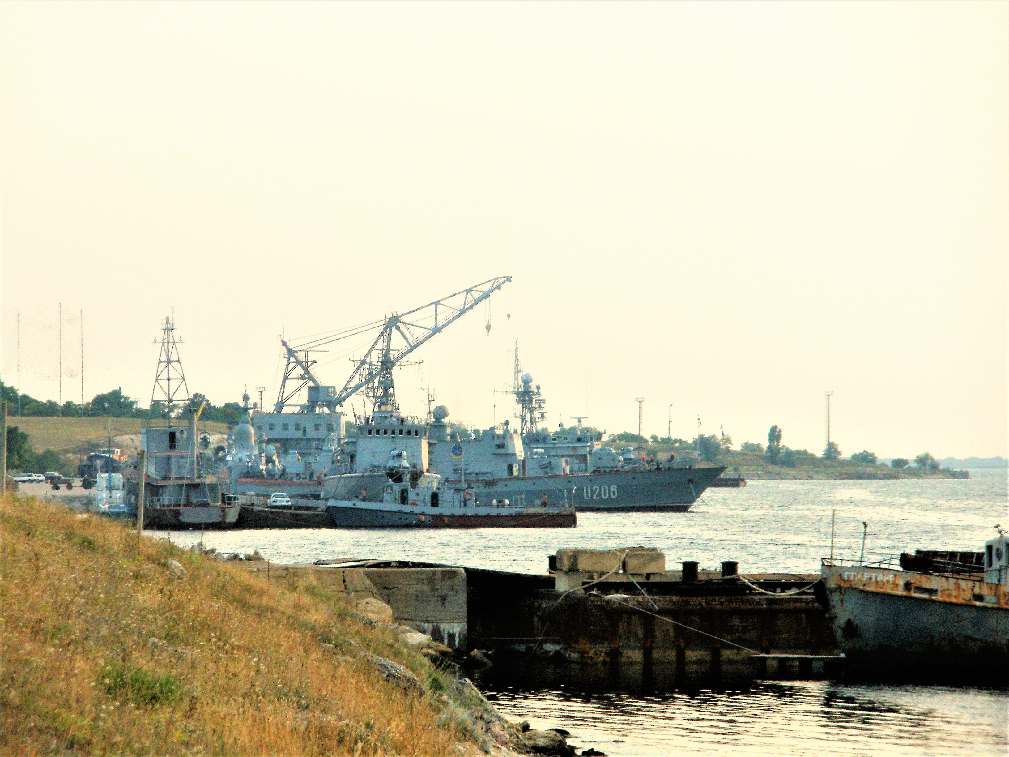 База ЮВМБ Украины